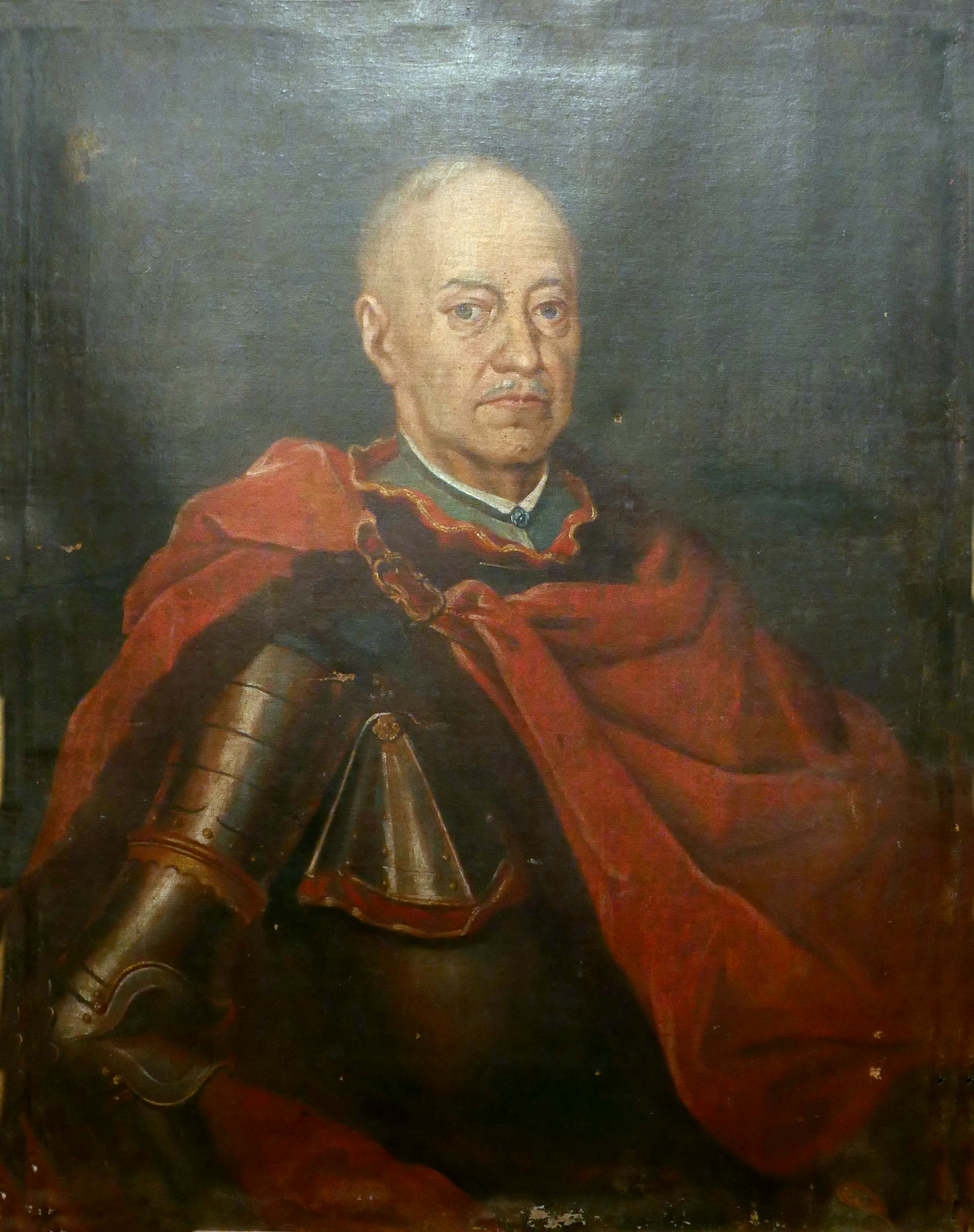 Беларуская (тарашкевіца): Партрэт Яна Яўстаха Касакоўскага (Jan Jaŭstach Kasakoŭski)